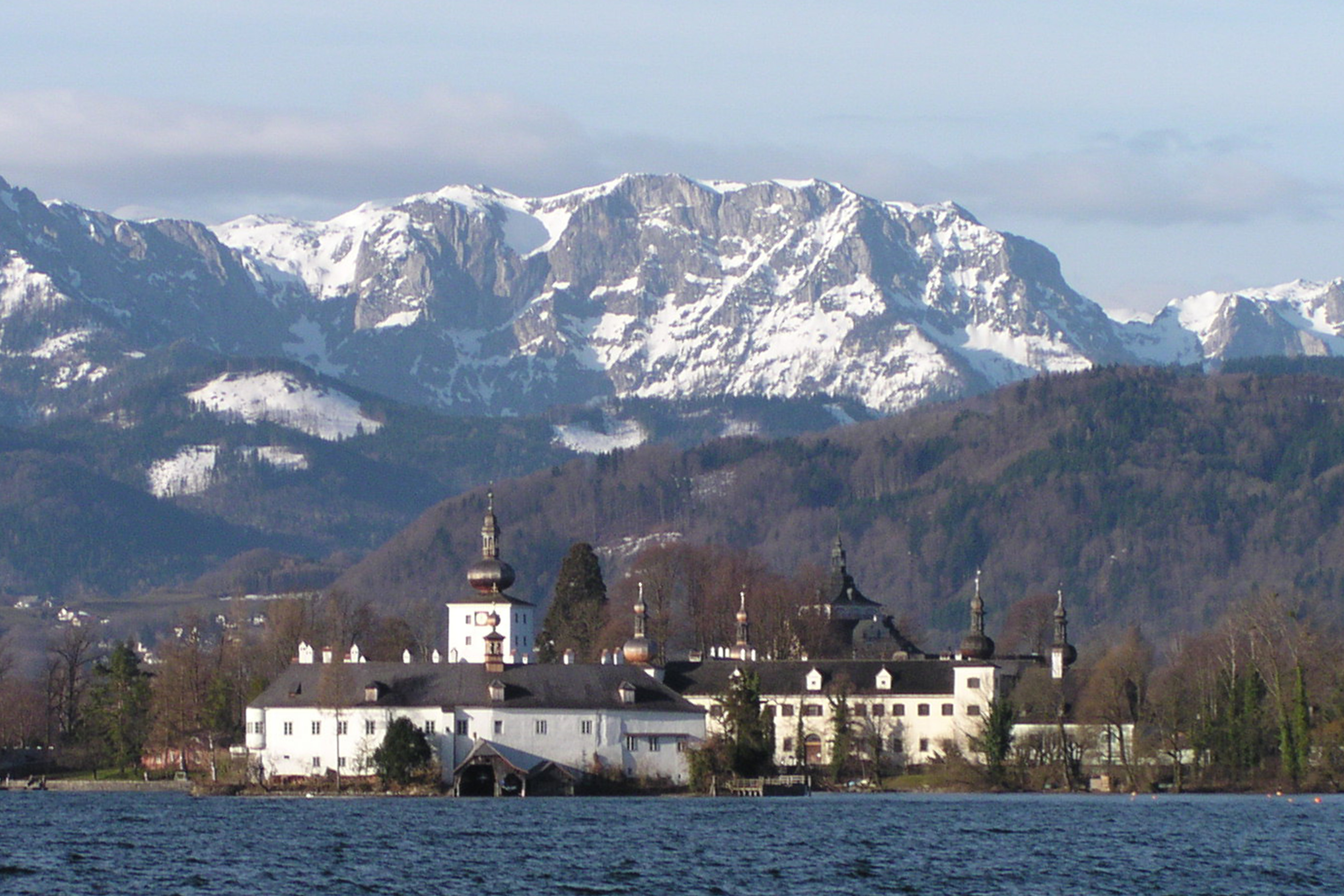 Seeschloss und Landschloss Orth crop